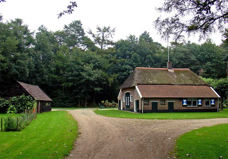 Nabij het Stegerveld (5 september 2006): op dezelfde plaats als waar de omslagfoto van traject I van het Pieterpad is gemaakt.